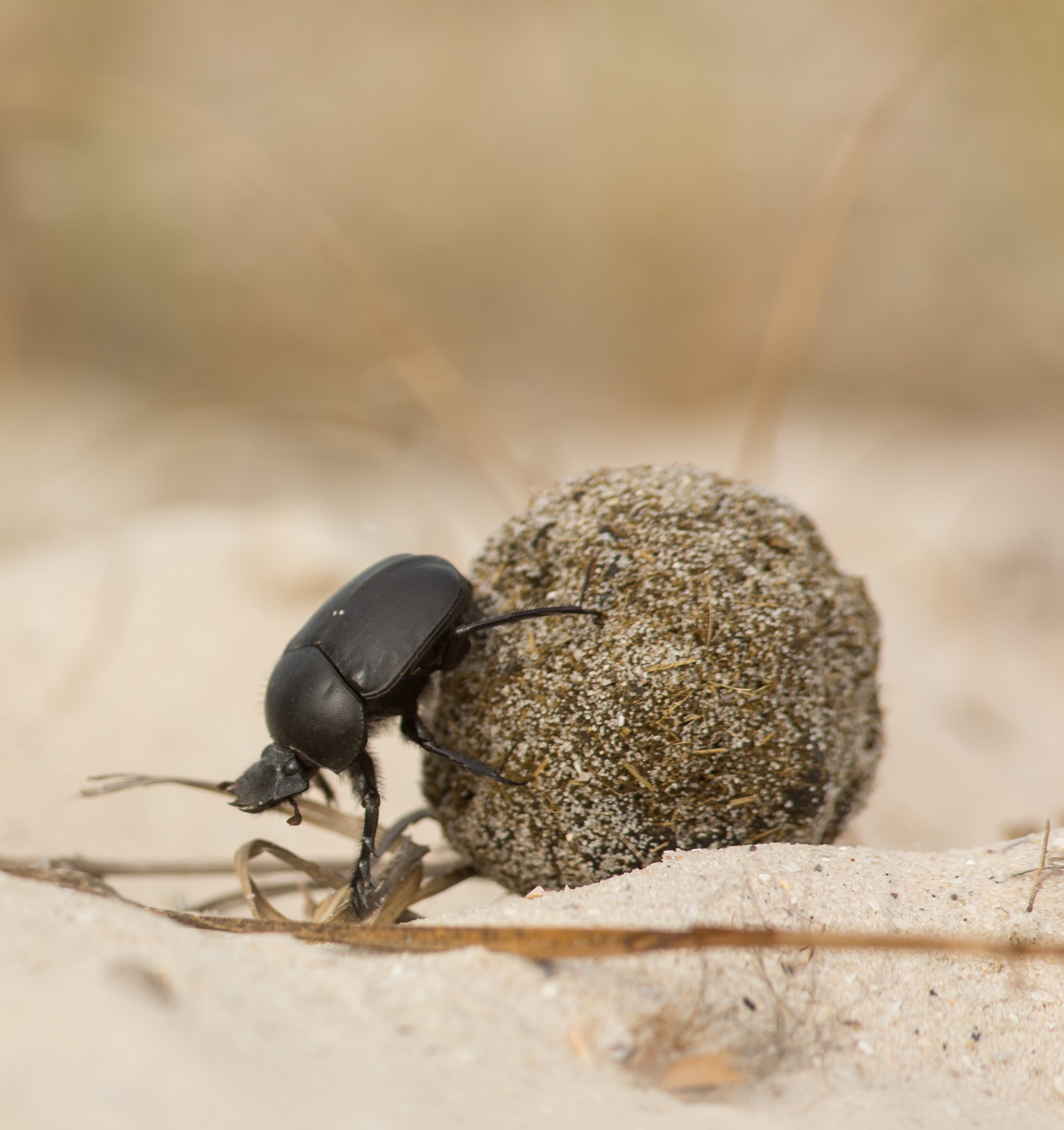 Знято під час експедиції на о. Джарилгач This photo/video of Dzharylhach was taken during Wikiexpedition to Dzharylhach supported by Wikimedia Ukraine. You can see all photographs in category Category:Wikiexpedition to Dzharylhach. English | українська | +/−